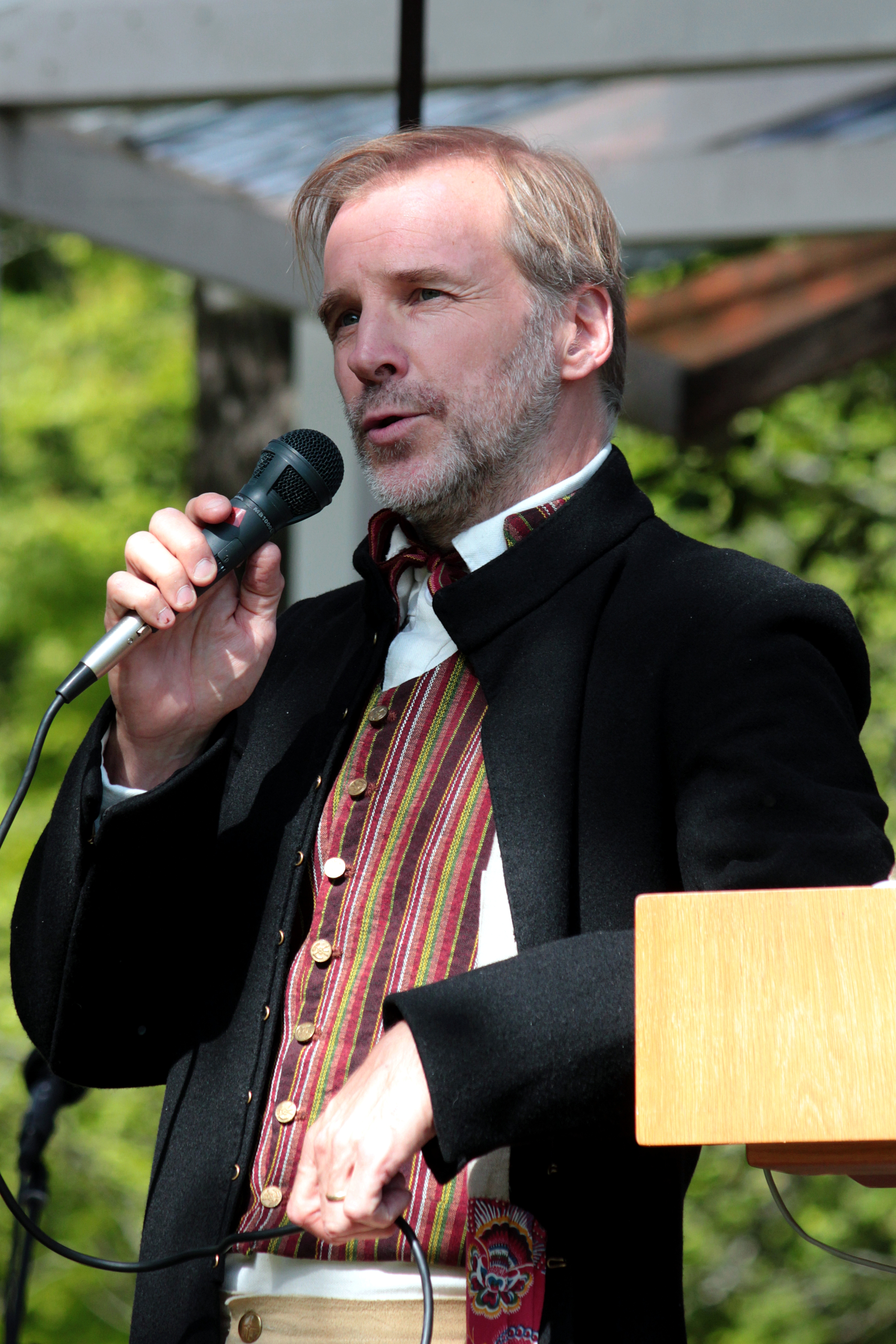 Lars Hjertner, klädd i Bys sockendräkt, på midsommarfirandet i Horndal 2012.